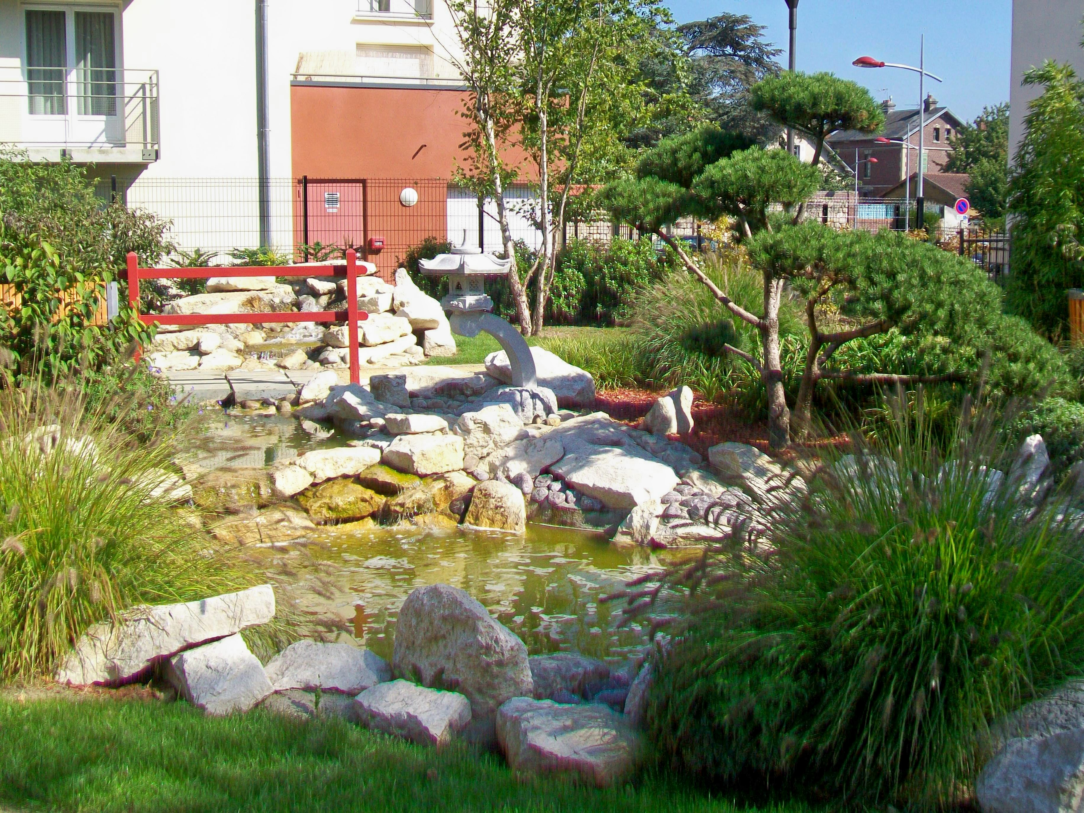 Le jardin japonais du square Philippe-Decourtray (ancien conseiller municipal), rue Gambetta.